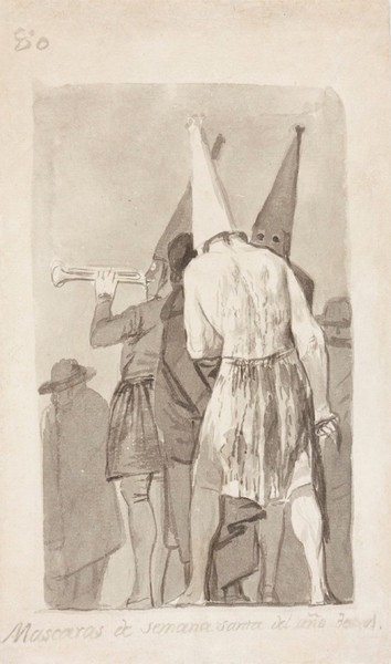 Drawing; Drawings